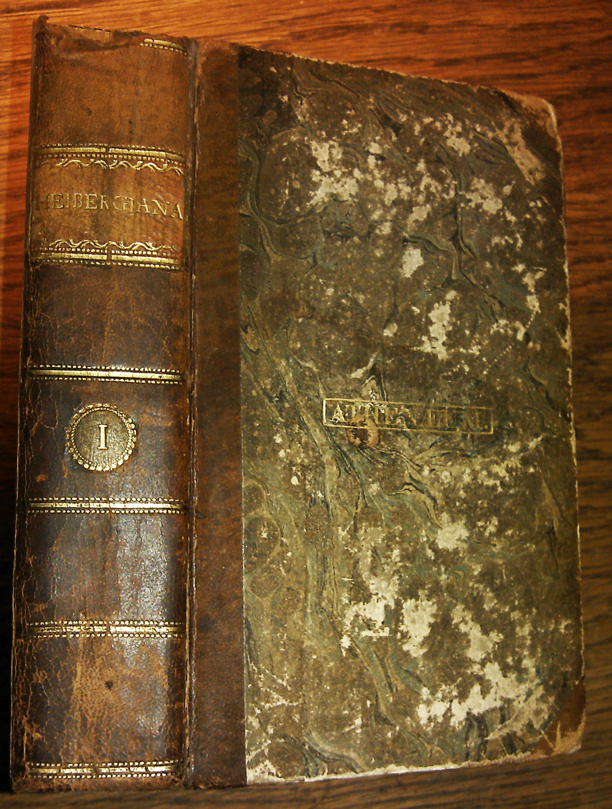 Bog fra det københavnske læseselskab Athenæum, med selskabets navn i guld på forpermen. Bindet er et samlingsbind som indeholder pamfletter i forbindelse med trykkefrihedssagerne mod P.A. Heiberg i 1790'erne.